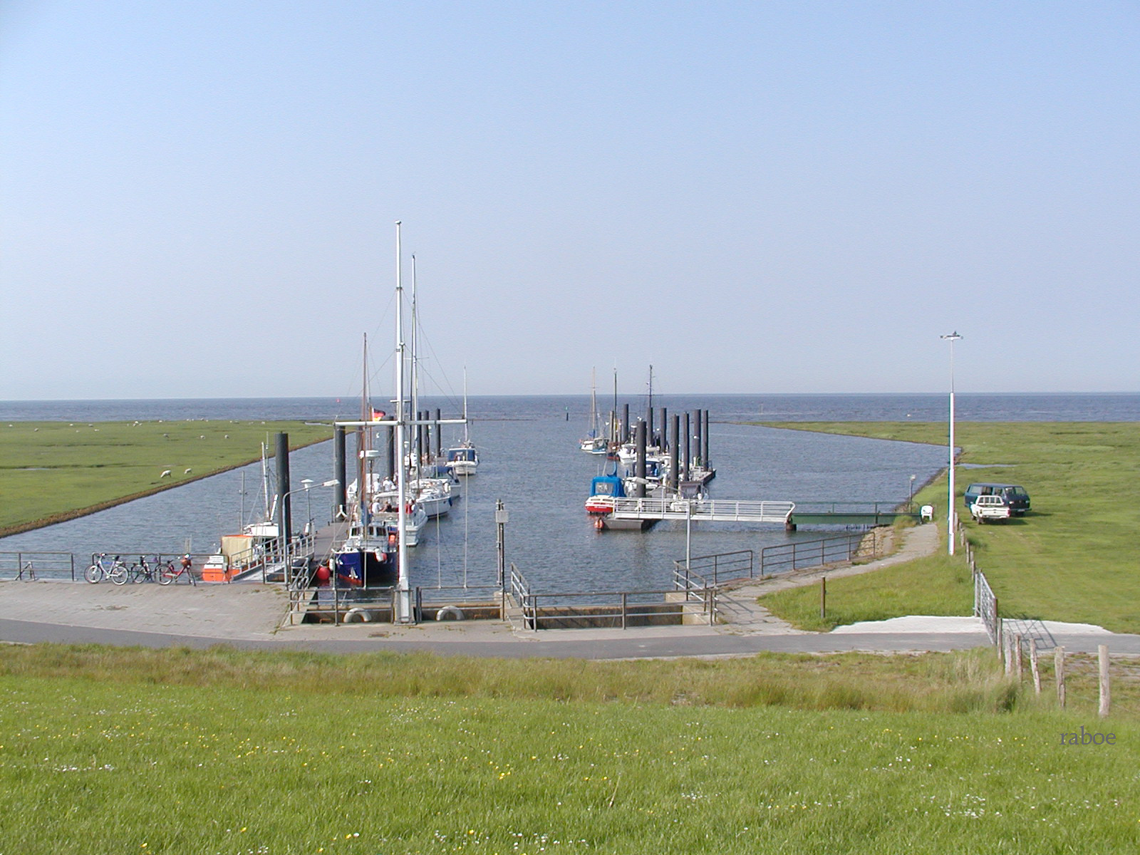 Der kleine Hafen von Altenbruch